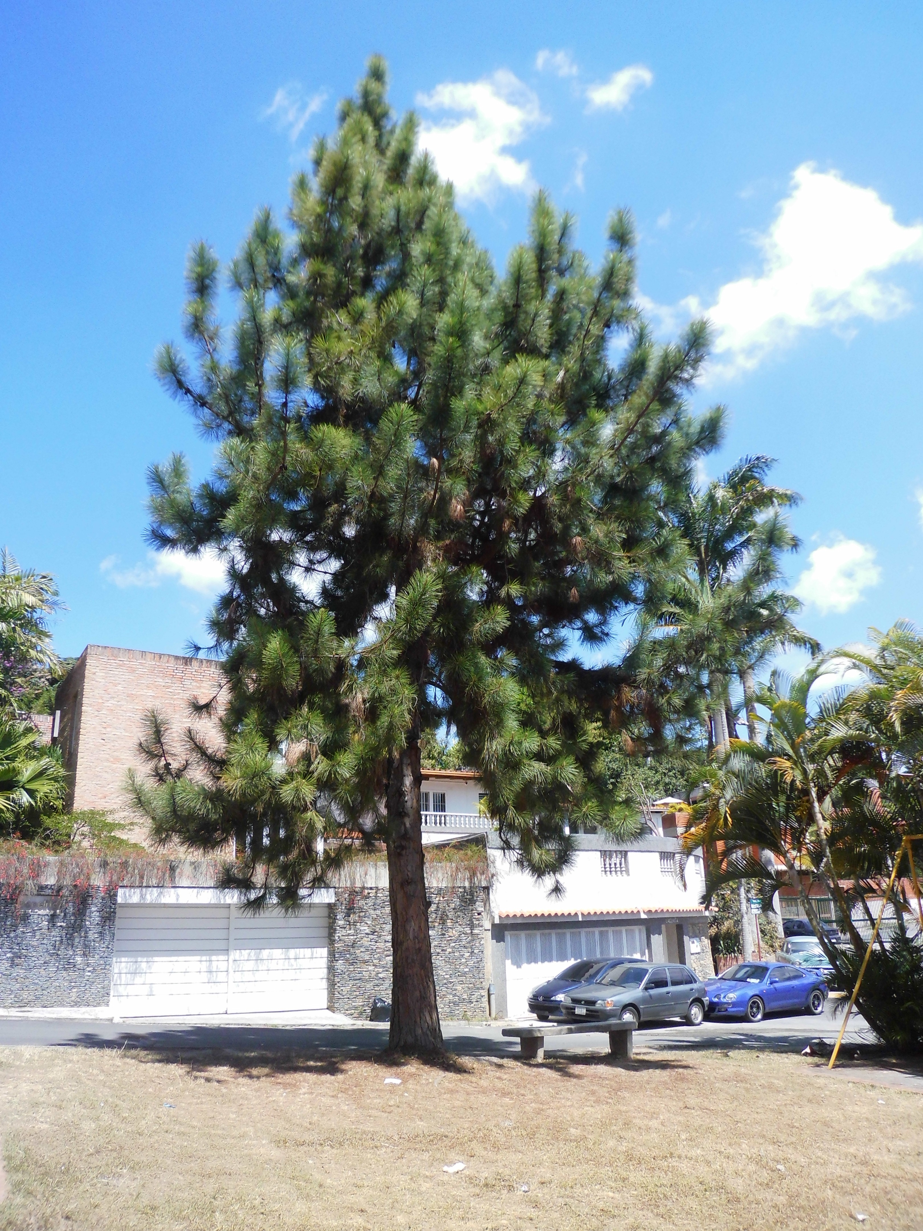 Pinus caribaea Morelet 1851 localizadas en La Boyera y Los Pinos 1 en el municipio El Hatillo, estado Miranda - Venezuela.